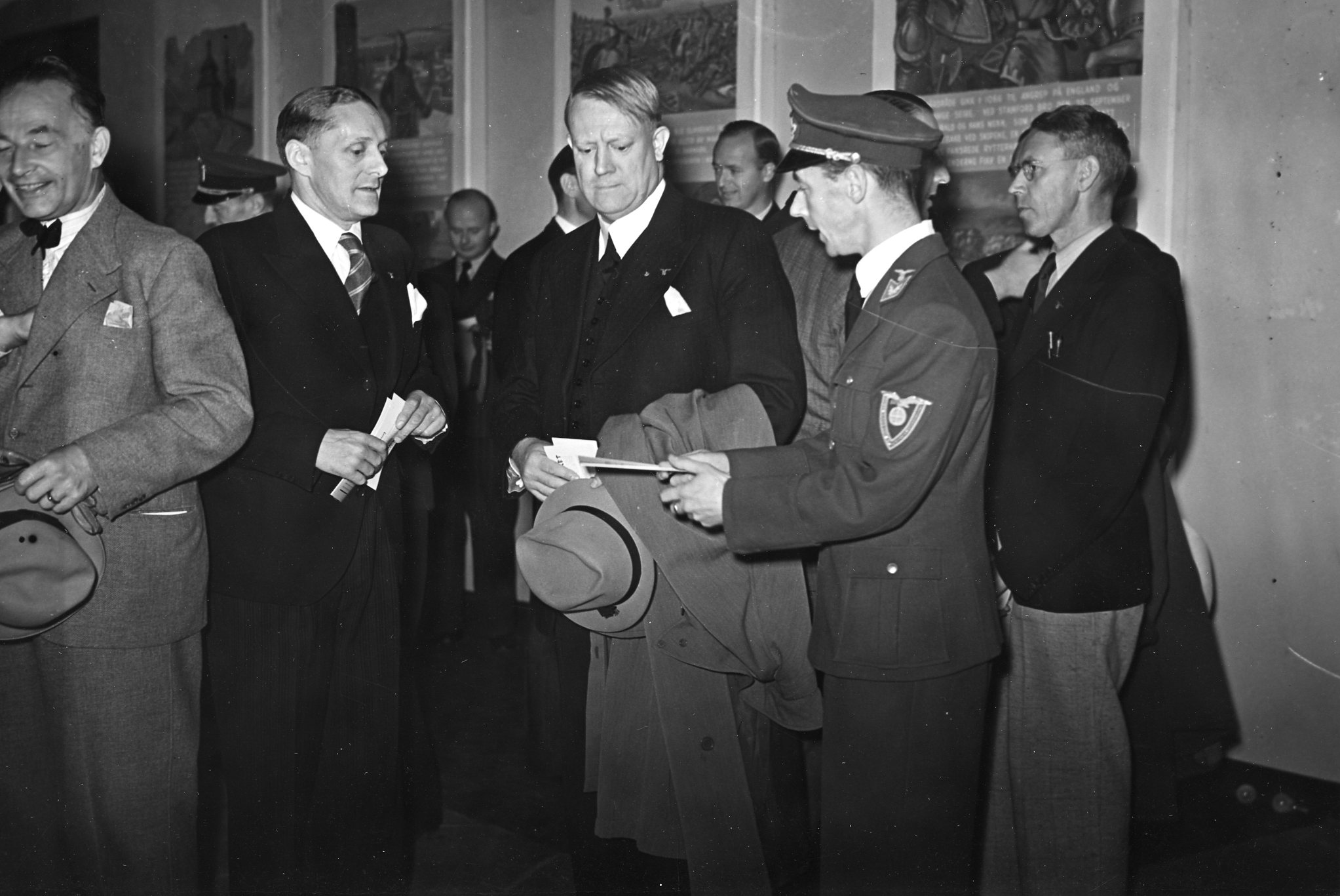 08.-28.09.1941. 1941/09/08. RA/RAFA-3309/U 38B/8/38-8-10 img132